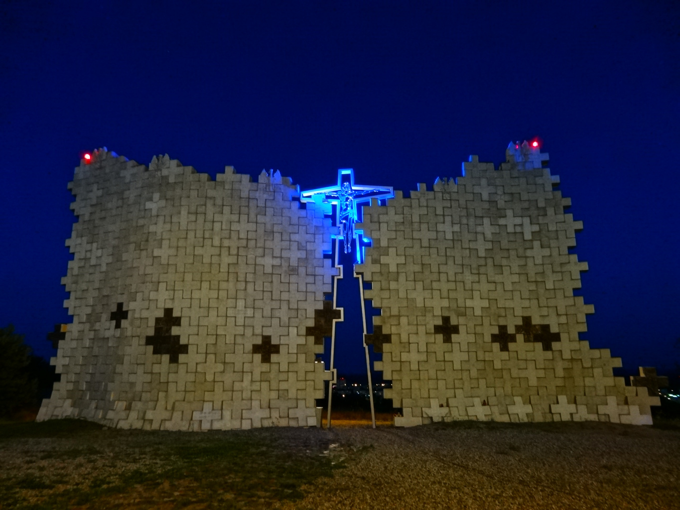 Brama do Nieba - ostatnia stacja drogi krzyżowej w Dolinie Śmierci w Bydgoszczy. Element Kalwarii Bydgoskiej - Golgoty XX wieku